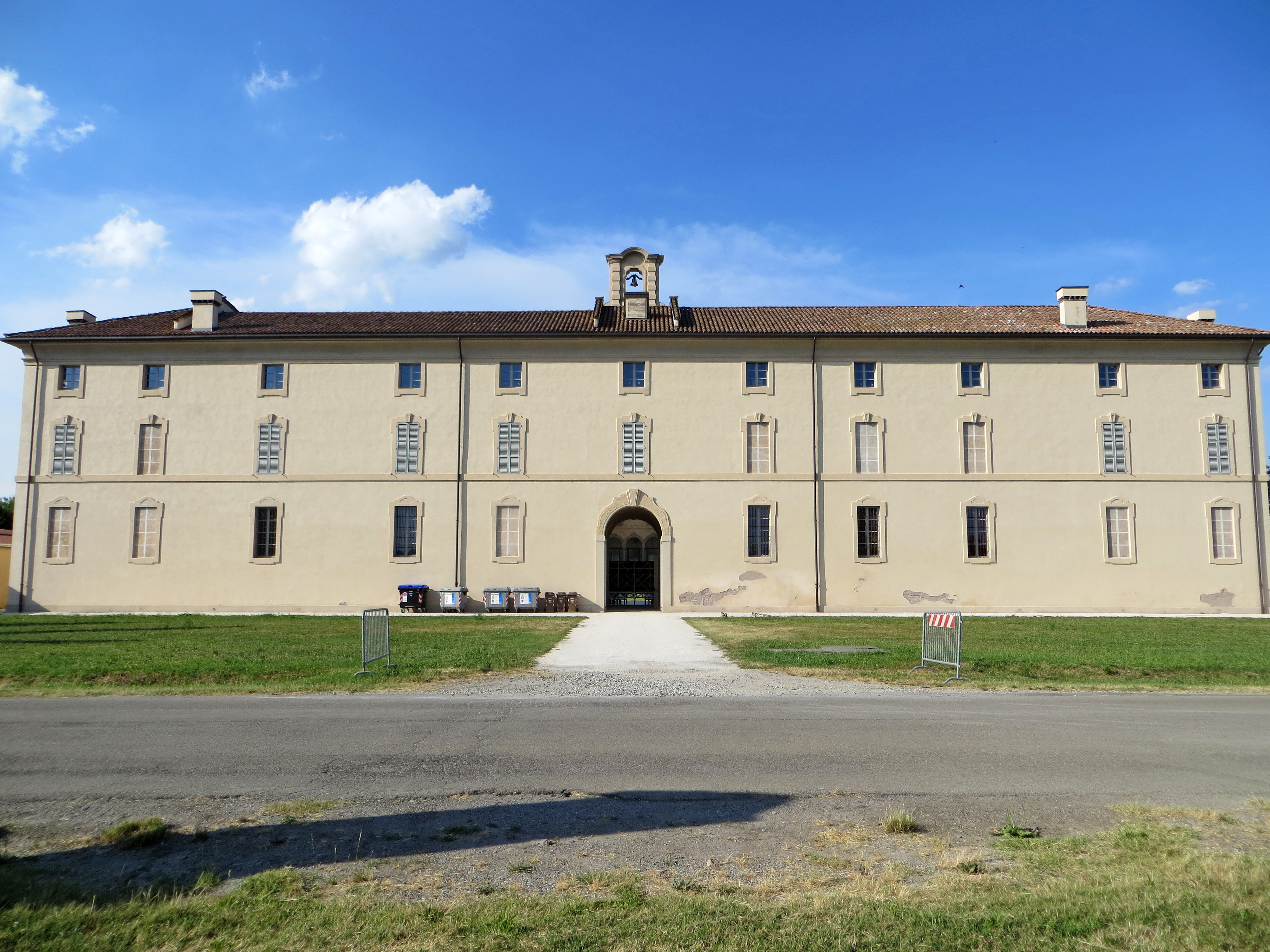 Villa Pallavicino (Busseto) - facciata del Palazzo delle Scuderie This is a photo of a monument which is part of cultural heritage of Italy.